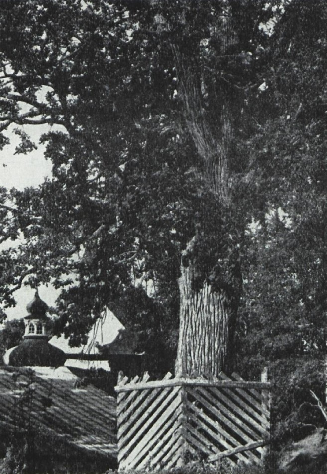 Püha tamm Petseri kloostris